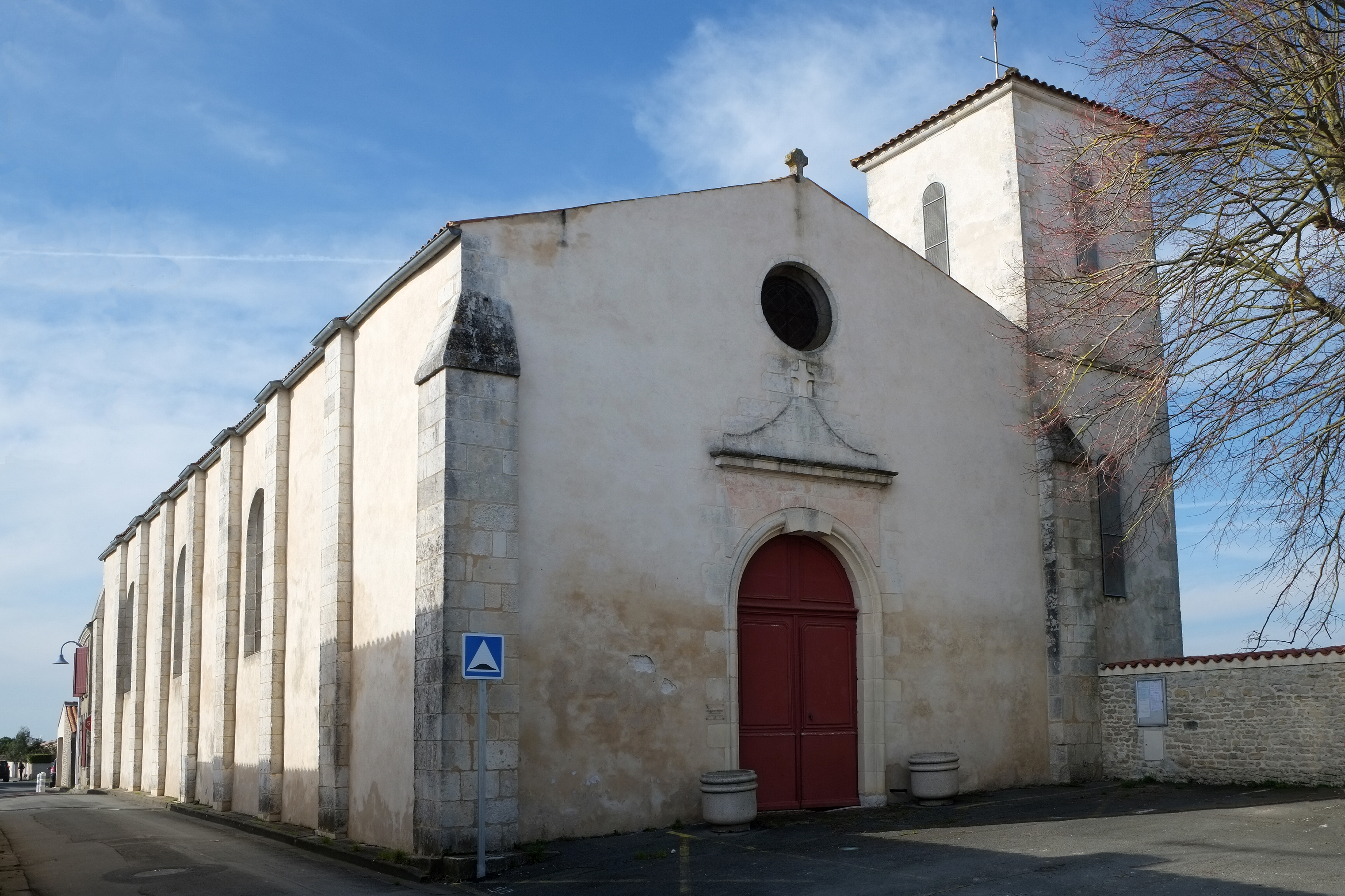 Église Saint-Martin Villedoux Charente-Maritime France